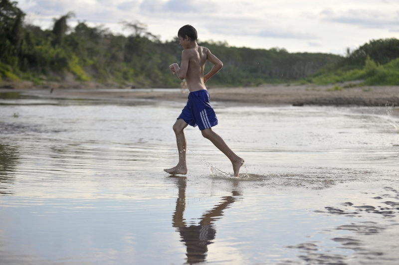 Assis Brasil (Acre) - Crianças brincam no rio Acre que faz divisa com o Peru. O Rio Acre tem apresentado níveis cada vez mais extremos, tanto nas enchentes quanto nas secas. A tendência é que a seca deste ano, que vai de agosto a outubro, a situação seja ainda pior. Com o período de seca a navegabilidade do rio fica comprometida e a travessia de uma margem a outra pode ser feita a pé.